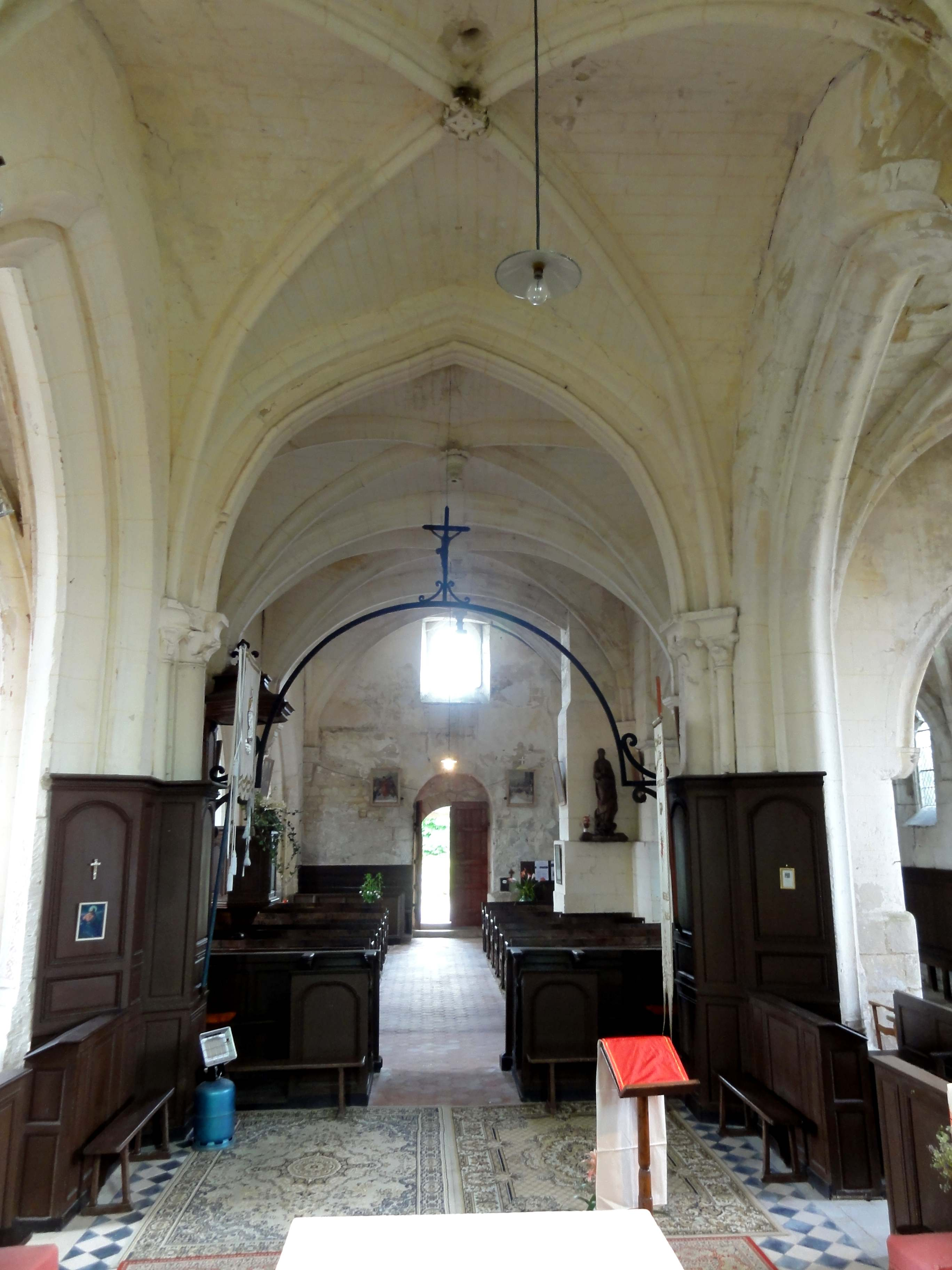 Intérieur de l'église - voir titre.